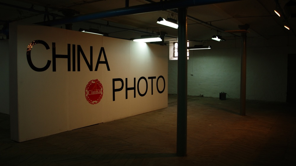 Wystawa "China Photo" w Łódź Art Center podczas 7. Międzynarodowego Festiwalu Fotografii w Łodzi